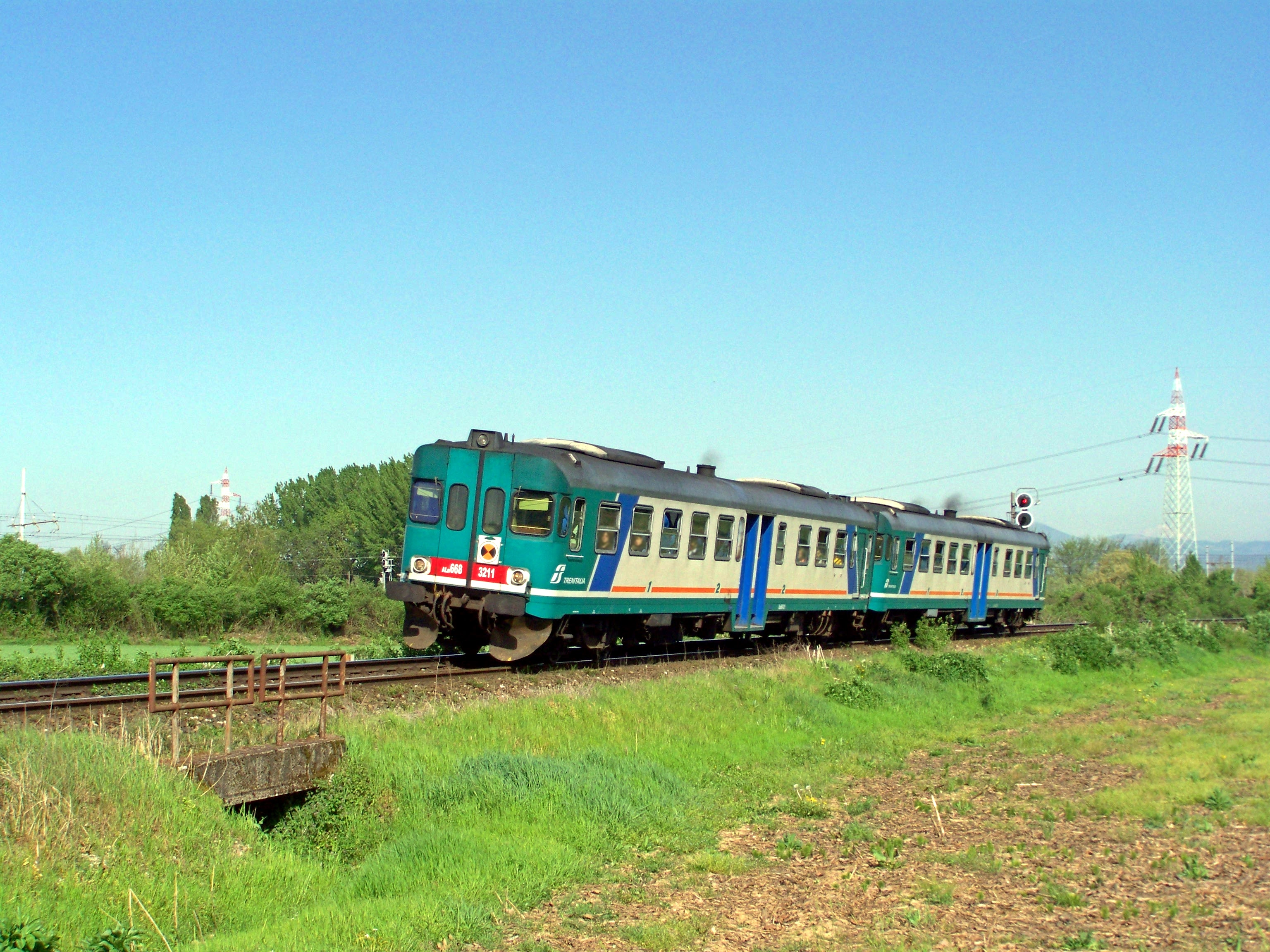 Regionale Trenitalia 2695 Brescia – Parma composto da ALn 668.3211+ALn 668.3221 in uscita dalla stazione di San Zeno-Folzano.